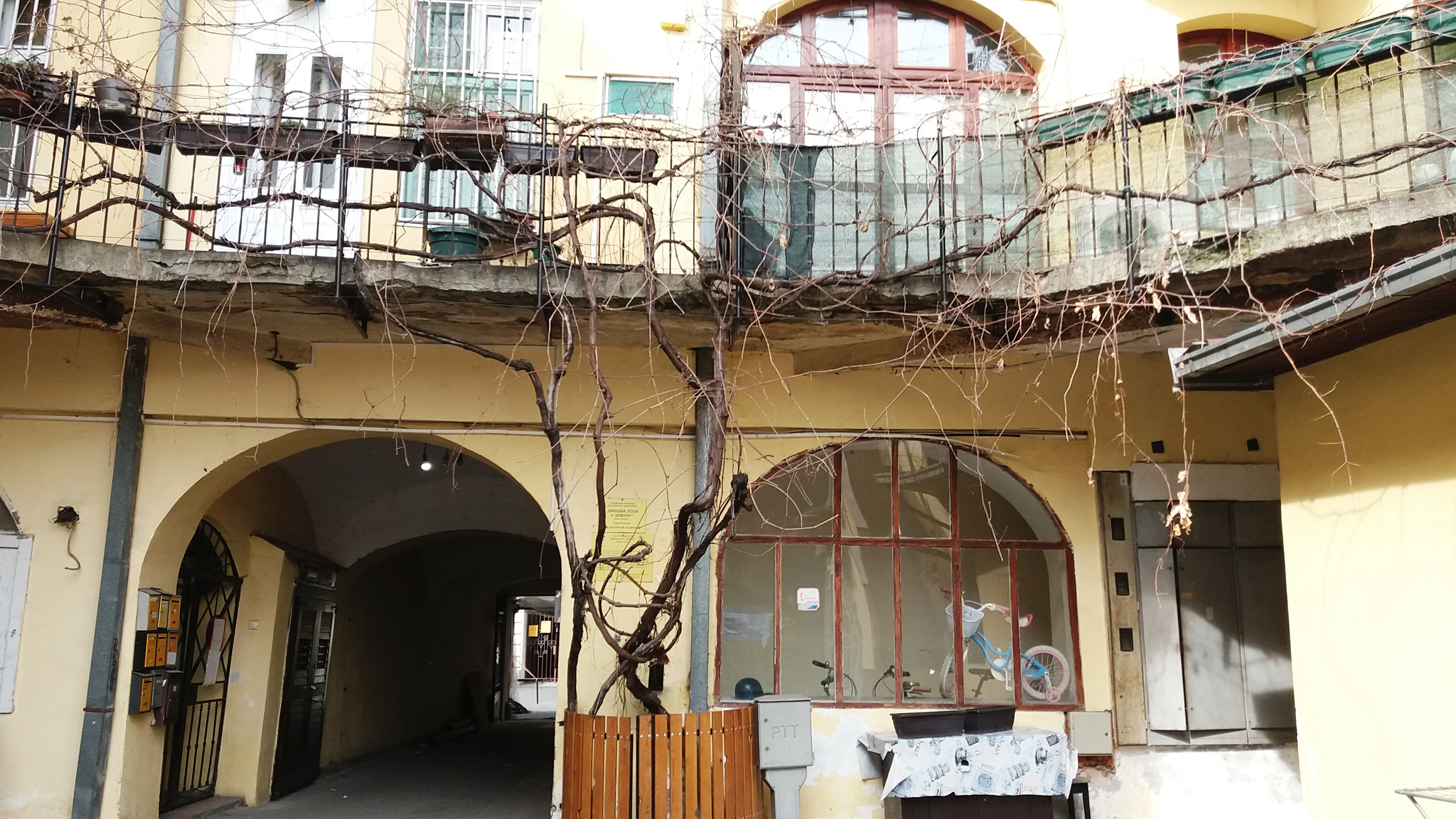 Споменик природе ботаничког карактера "Винова лоза у Земуну"